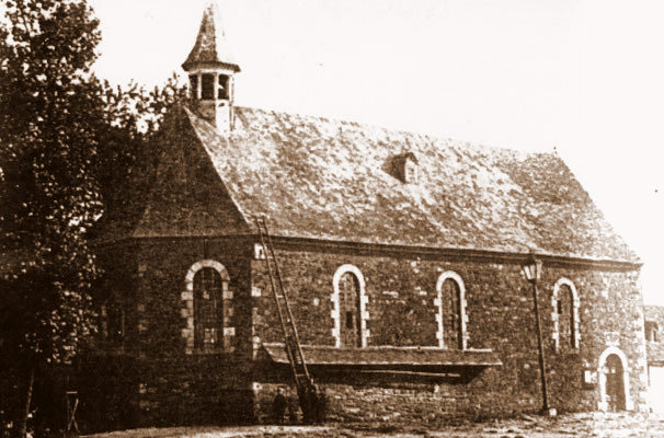 Bergkapelle vor der Umgestaltung 1887